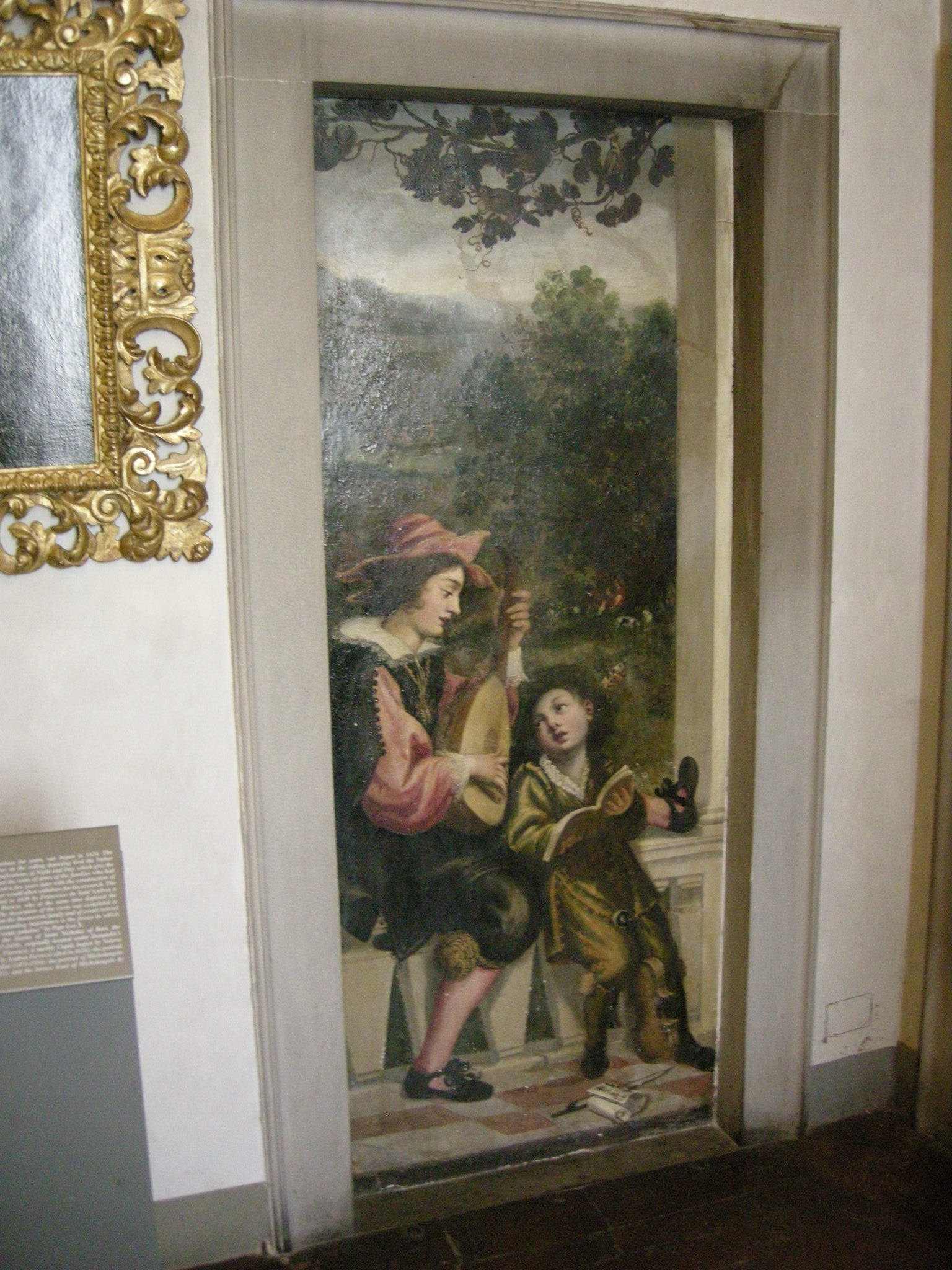 Casa buonaroti, camera della notte e del dì, 27 baccio del bianco